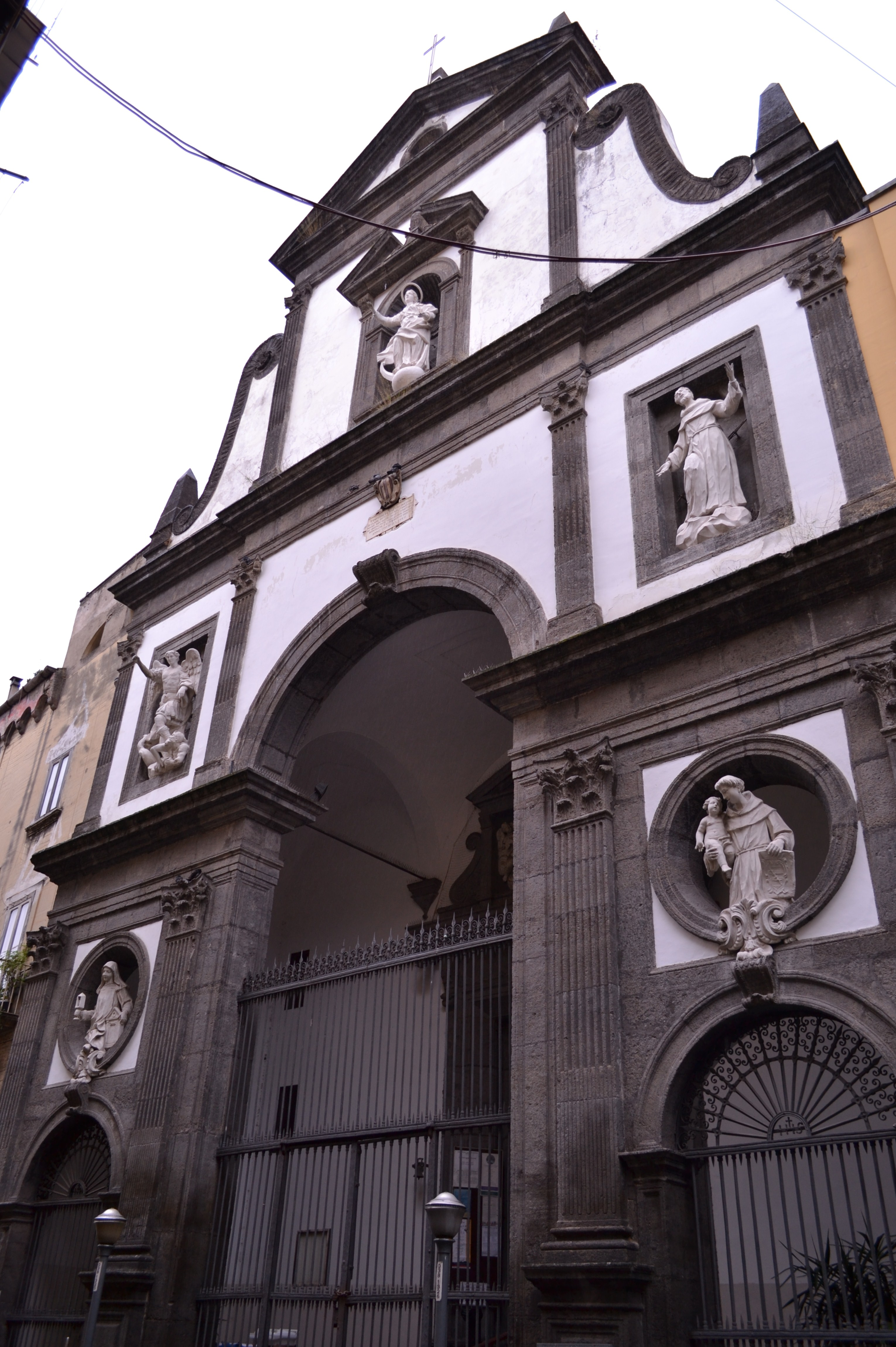 Chiesa del Gesù delle Monache (Napoli)